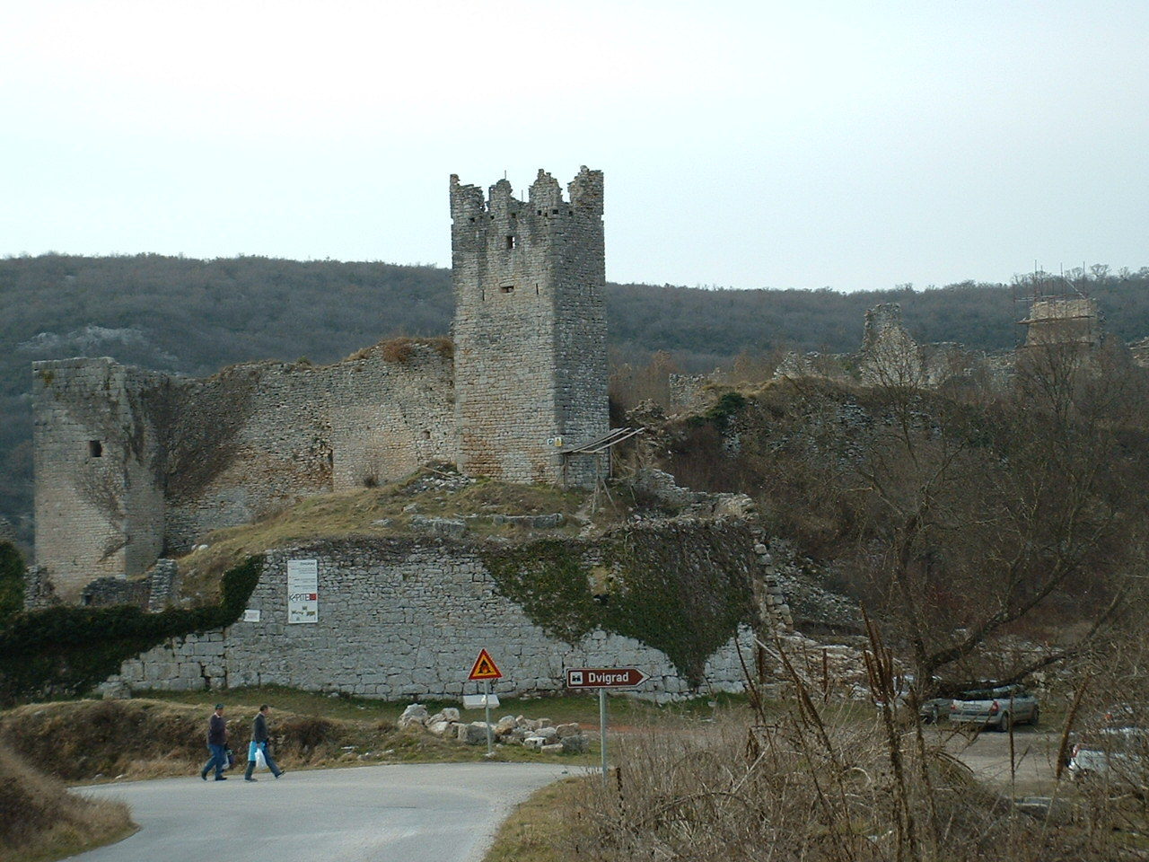 self-made